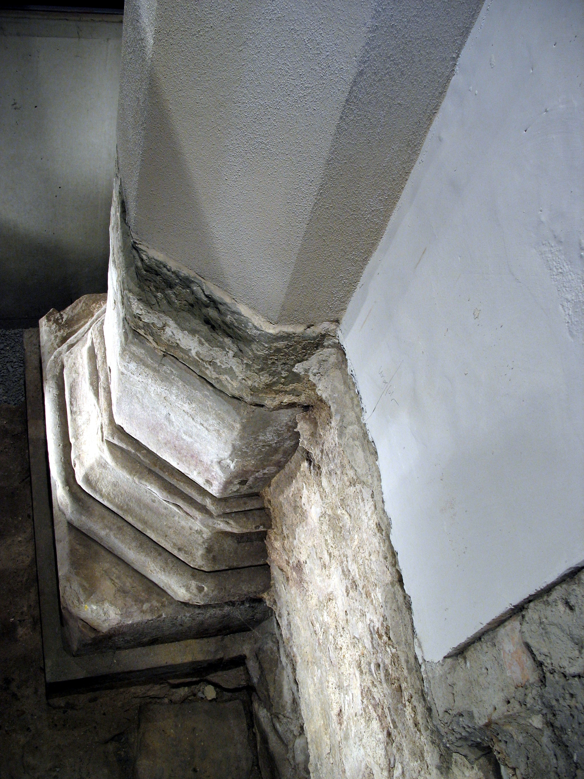 Konstanz, Dreifaltigkeitskirche, freigelegte Säulenbasis. Der Innenraum wurde um 1,4 m erhöht, so dass die Säulenbasen im Erdreich verschwunden sind.